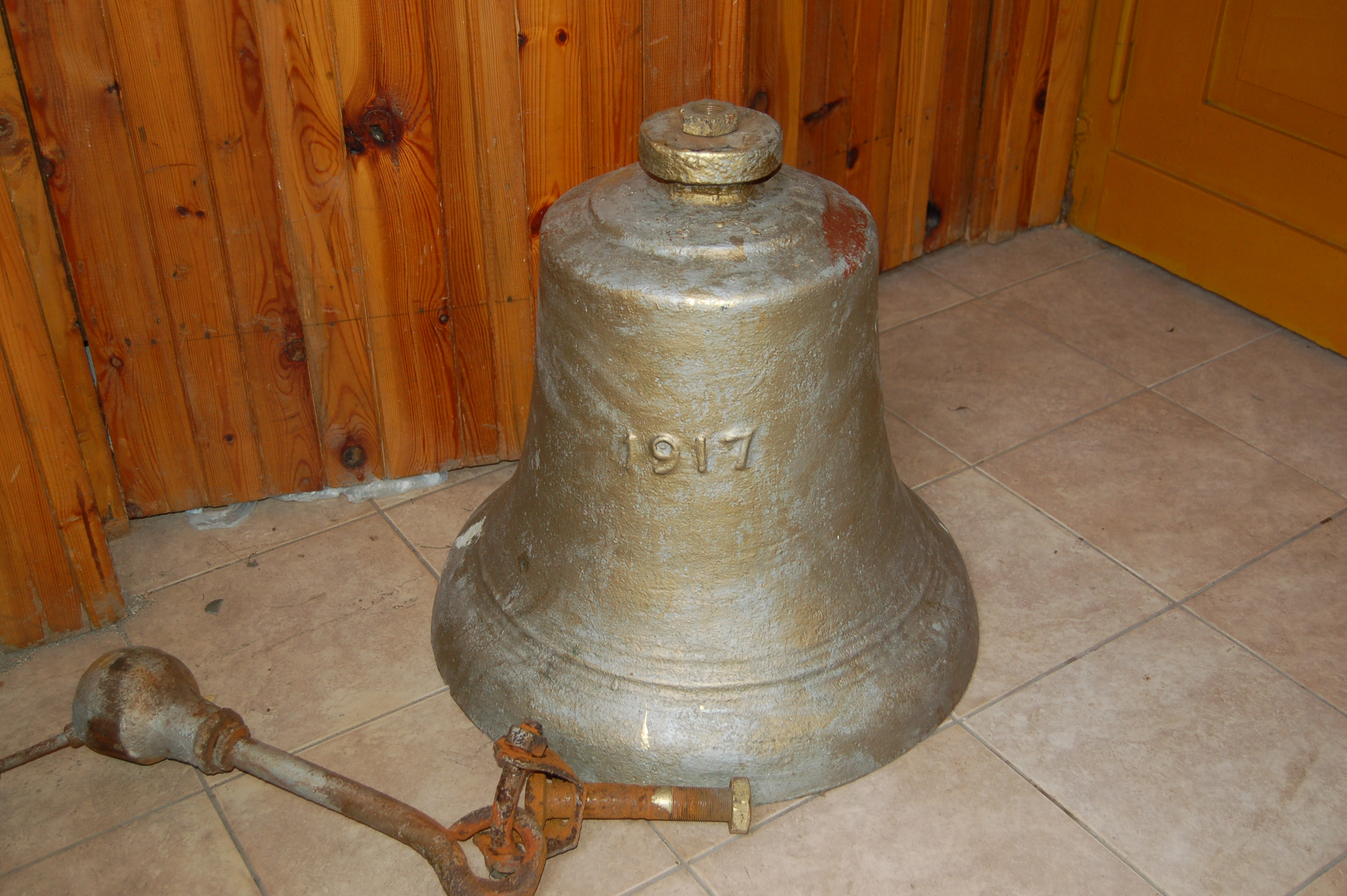 Dzwon z kościoła w Garbnie (Garbonii)